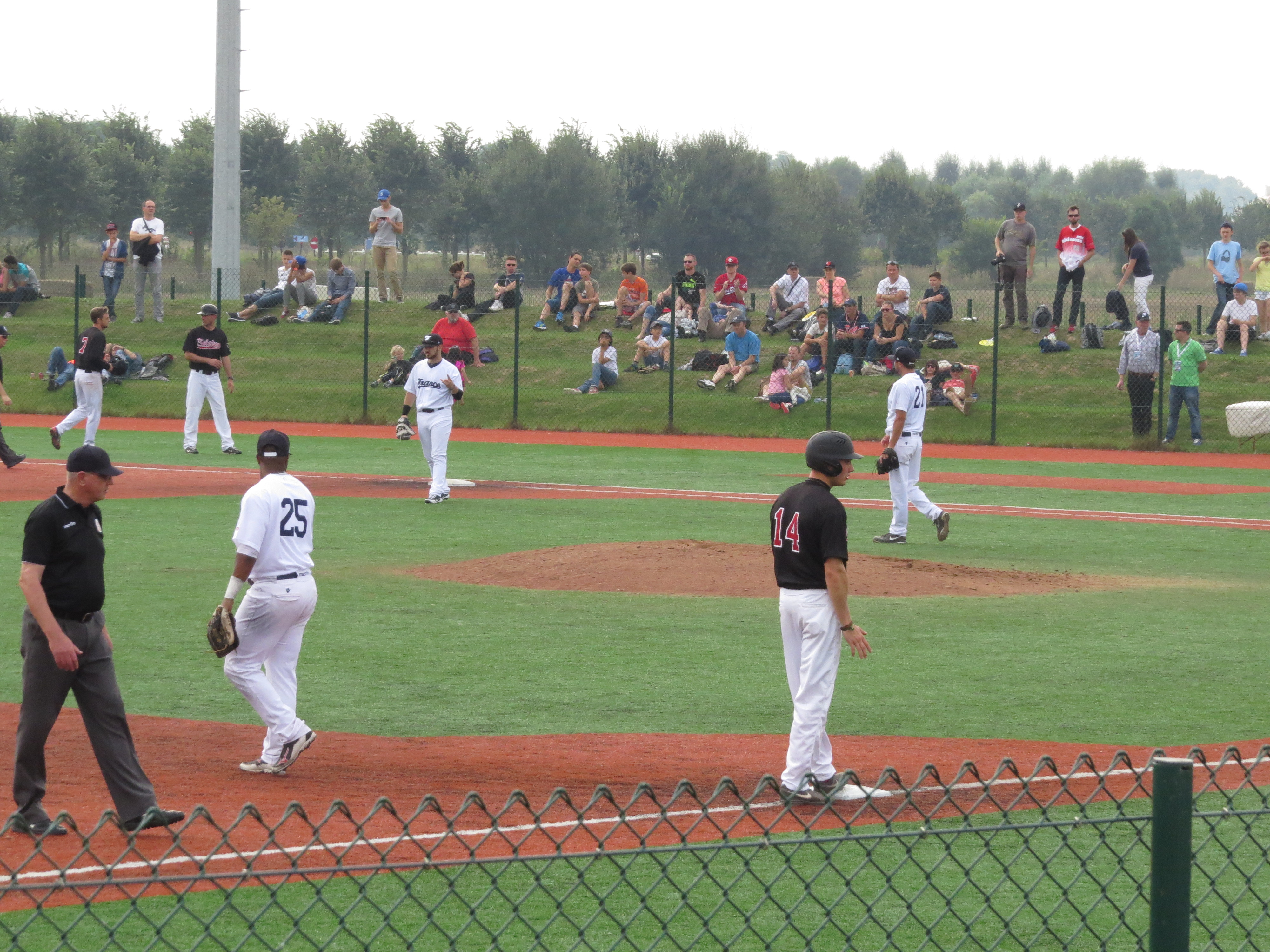 France International Baseball Tournament 2014 - France vs Belgique, Victoire de la France 6 à 3